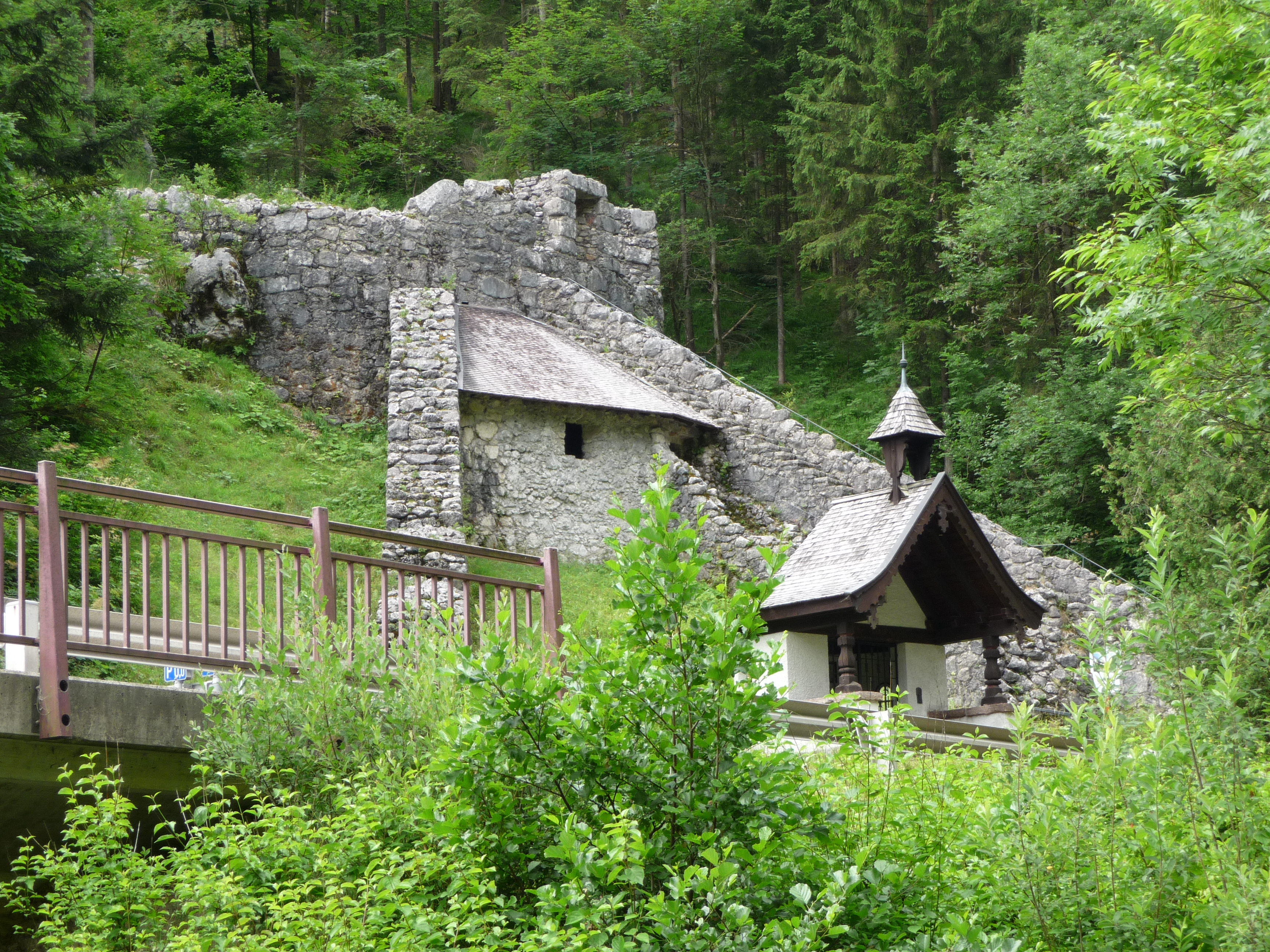 Ruine Festung Pass Strub